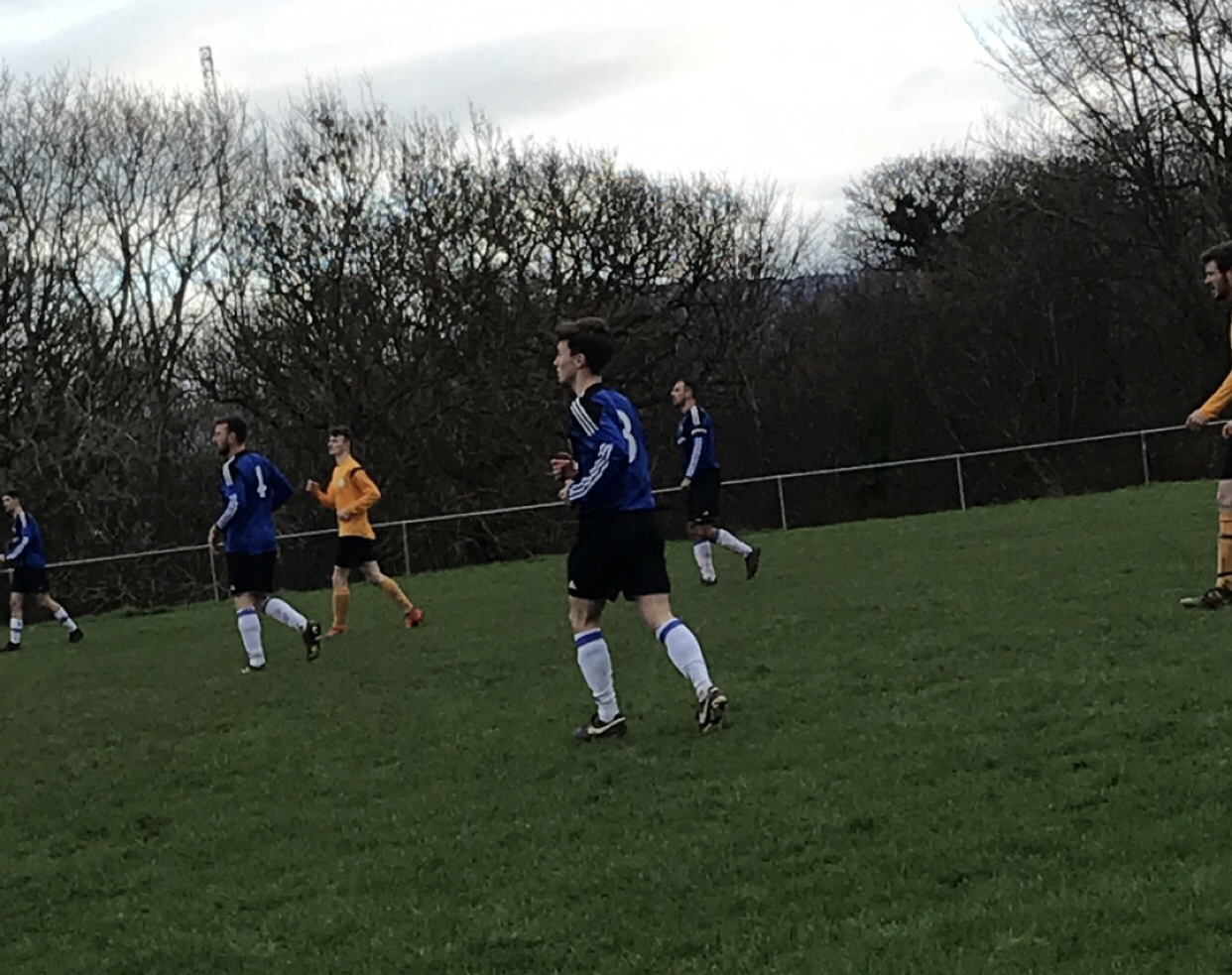 Llangoed vs Bro Goronwy 12-1-19